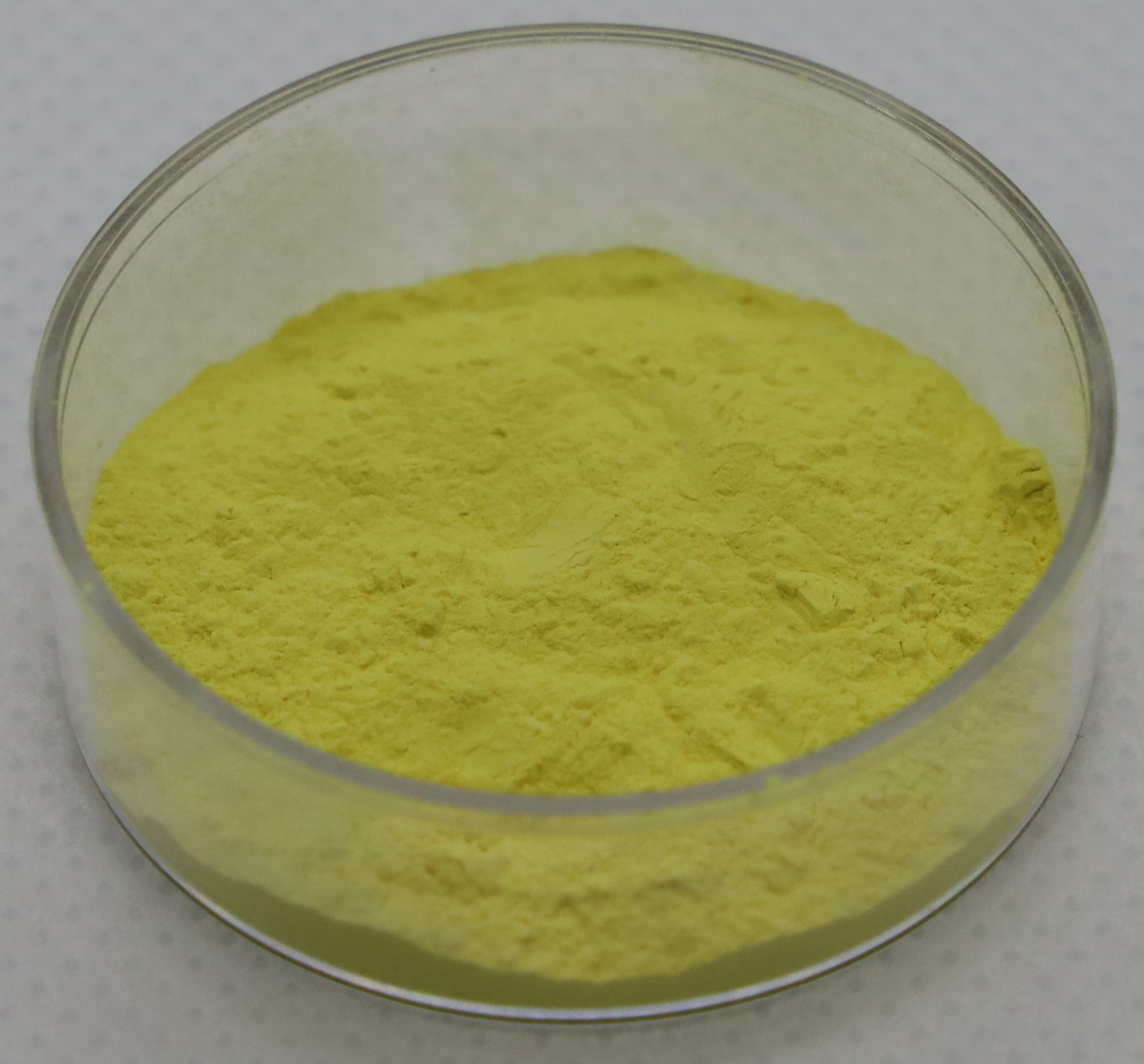 Uranylperoxide (UO4) Powder